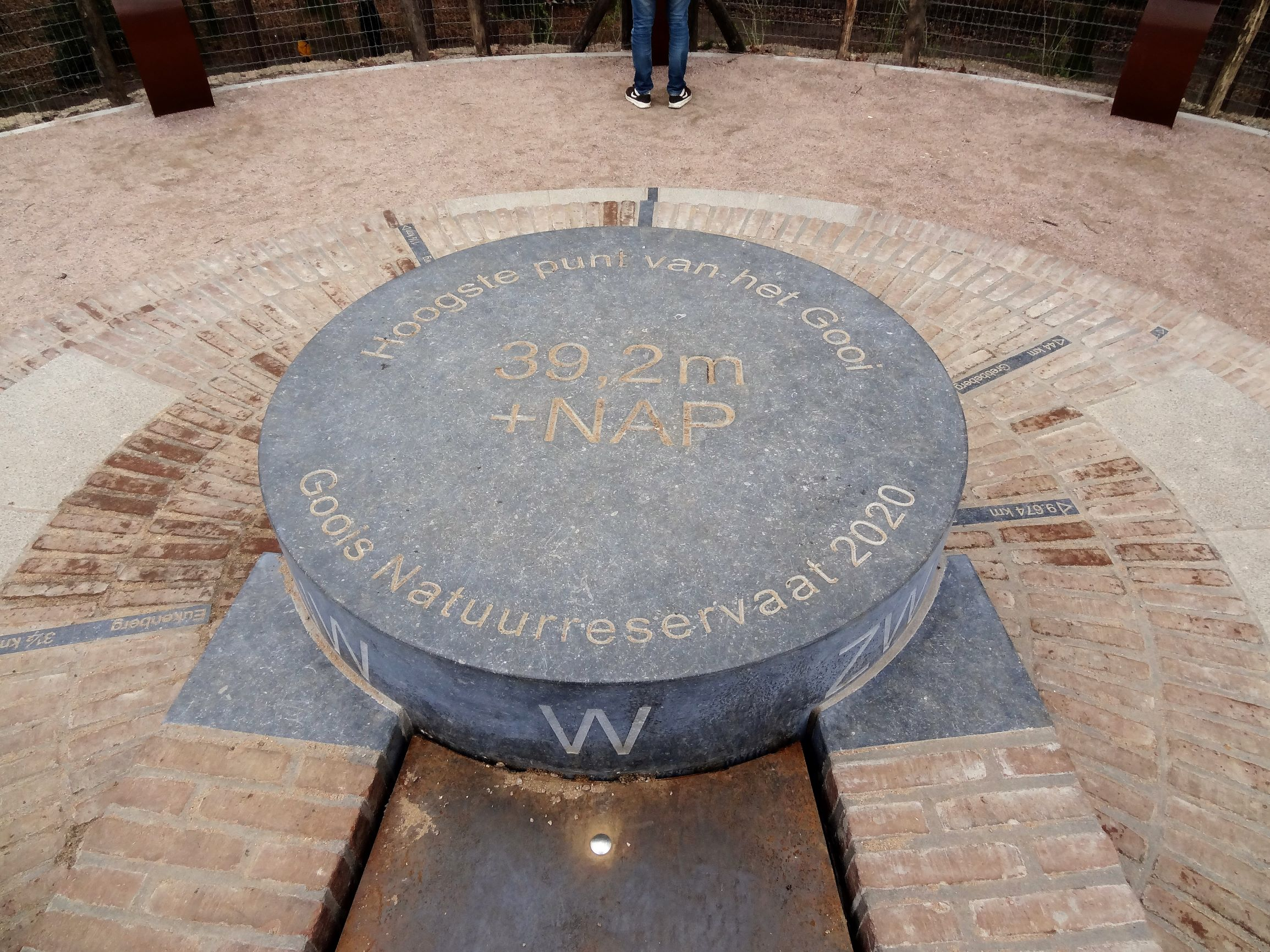 Tafelberg (Gooi) na renovatie begin 2020, markering top